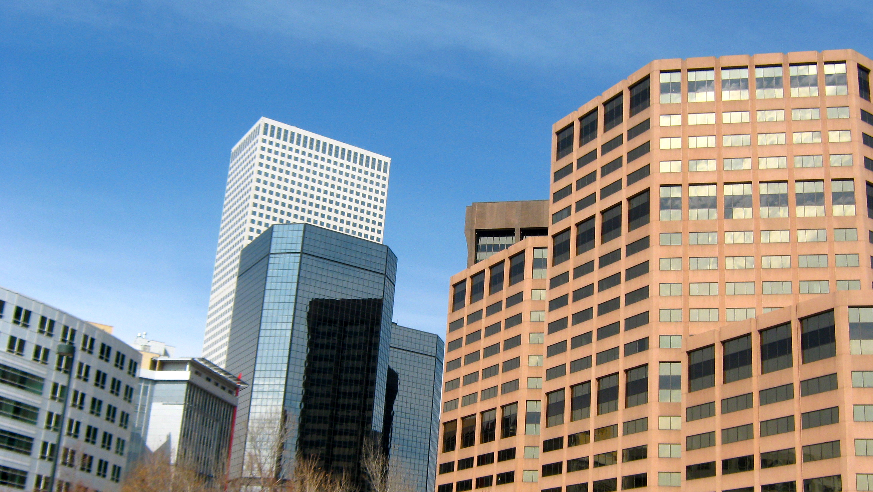 Denver, Colorado, Usaroadtrip 366